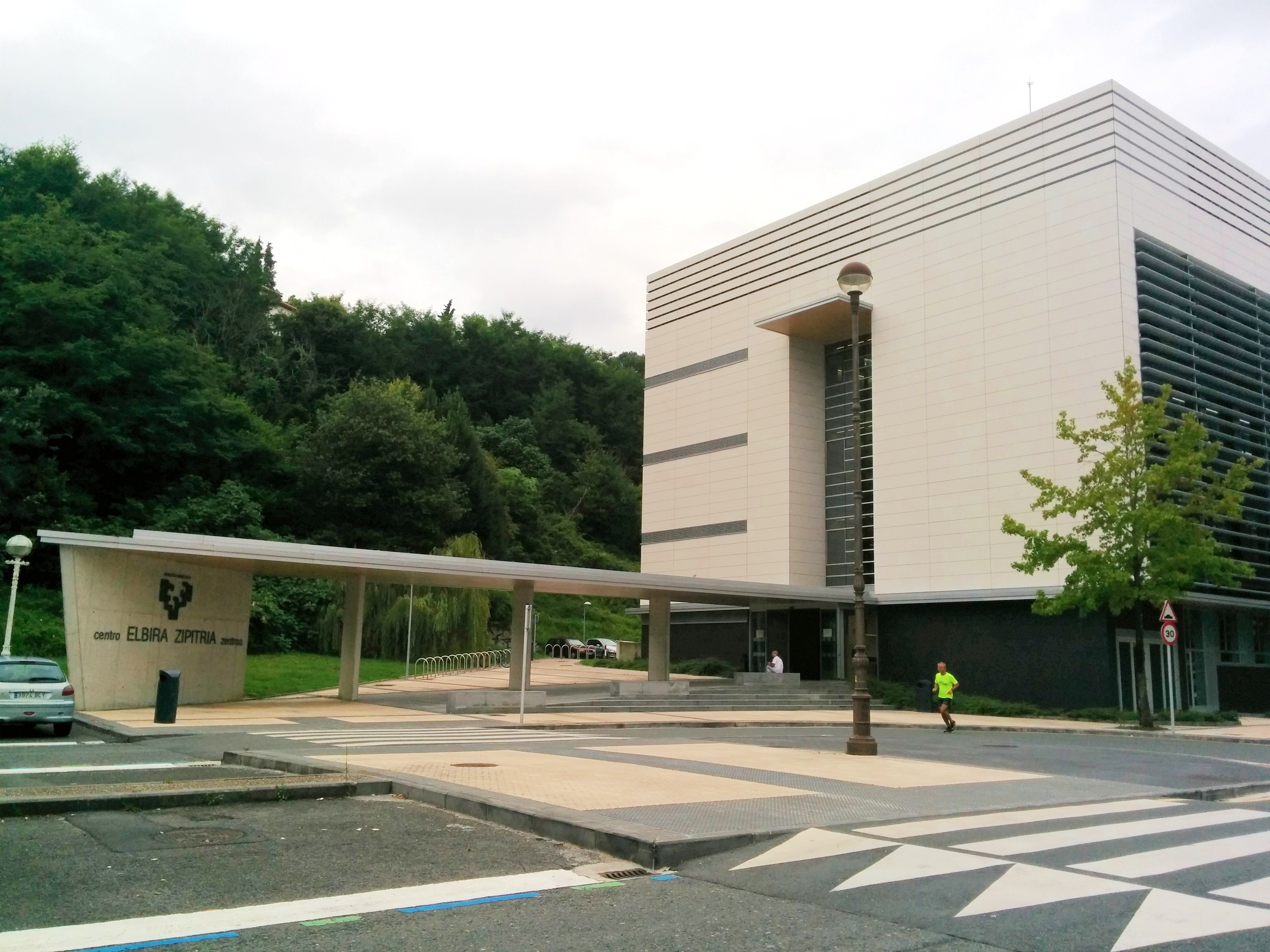 EHU, Donostia